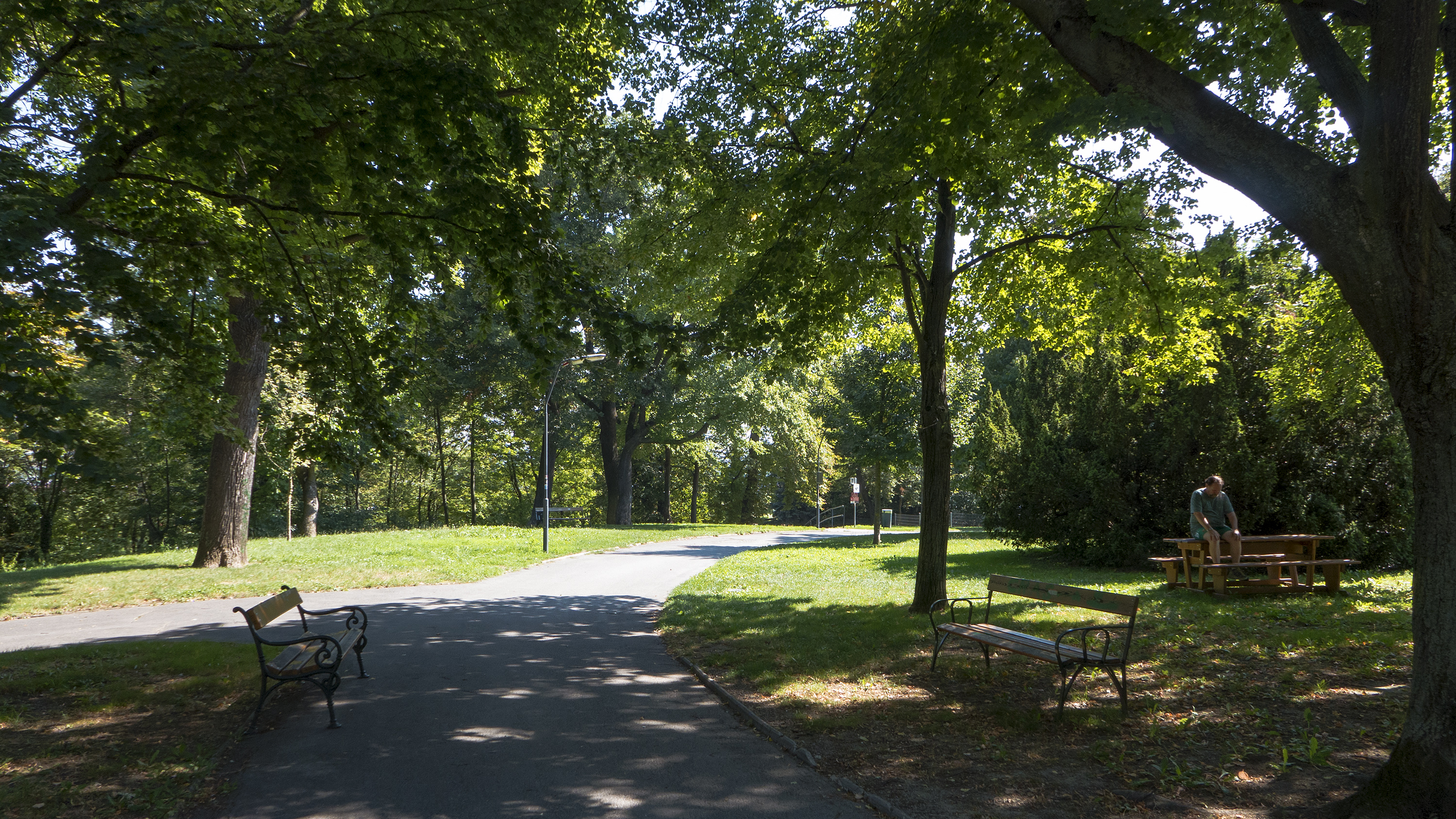 Heiligenstädter Park in Wien 19